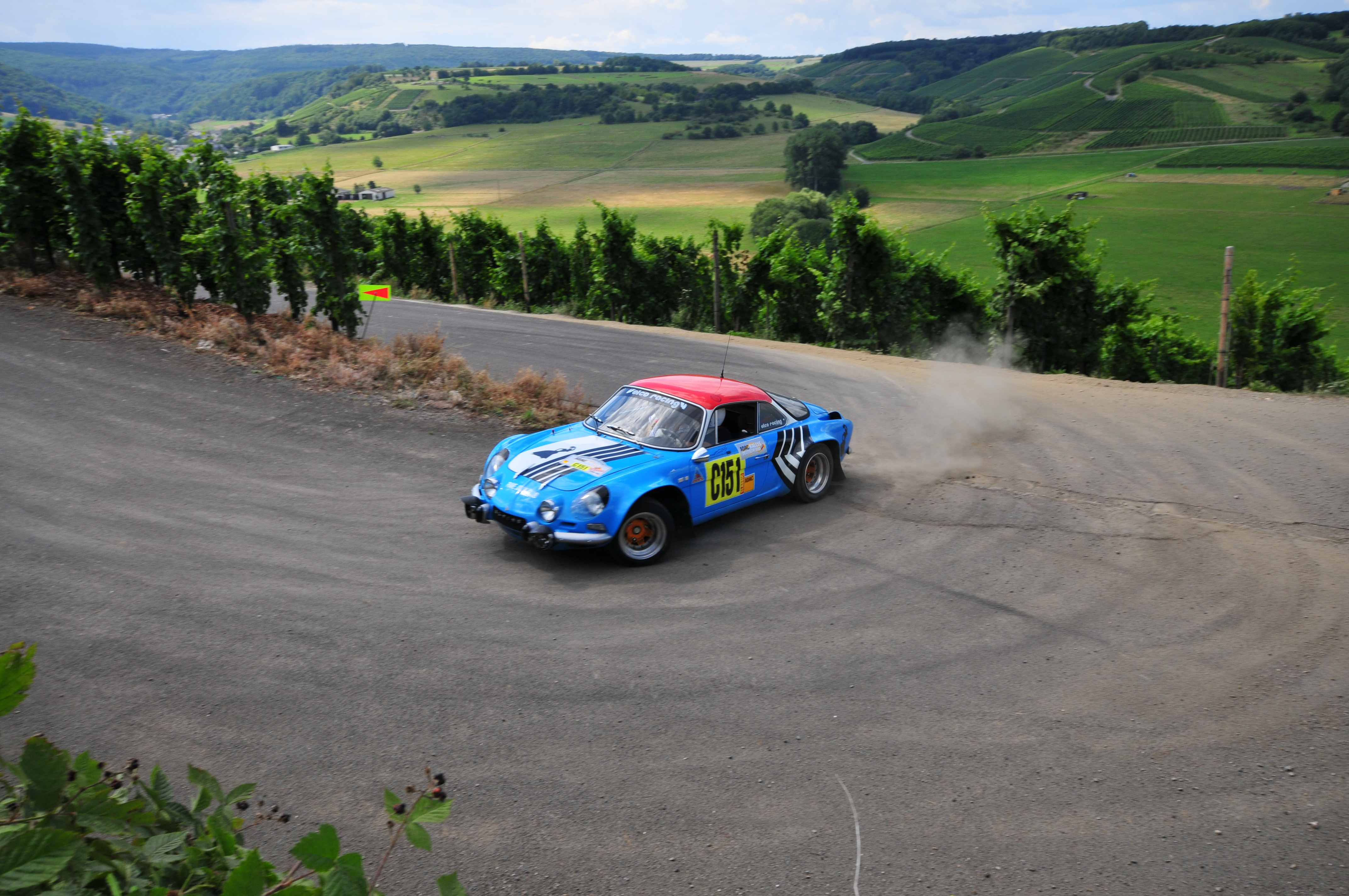 Renault Alpine A110 driven during the 2008 Rallye Deutschland.